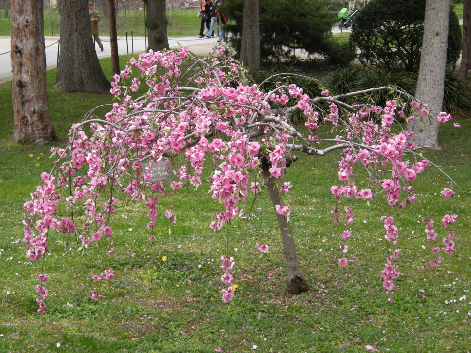 Prunus persica 'Pendula' (Schönbrunn, beneath Japanese Garden) 20080412 040